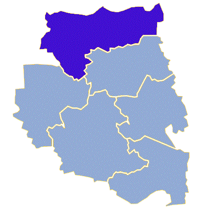 Powiat międzyrzecki, gmina Skwierzyna